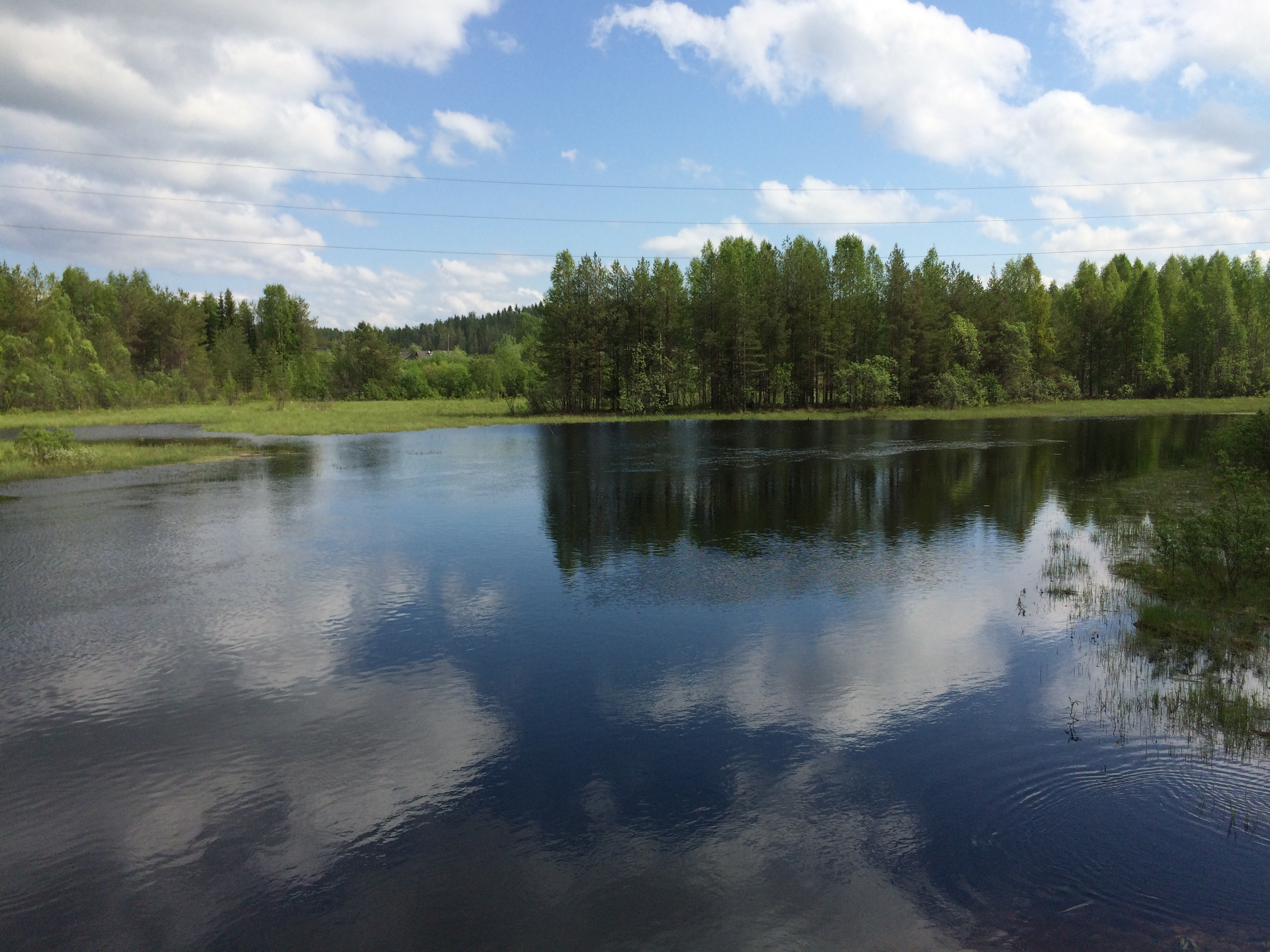 р. Гумарина